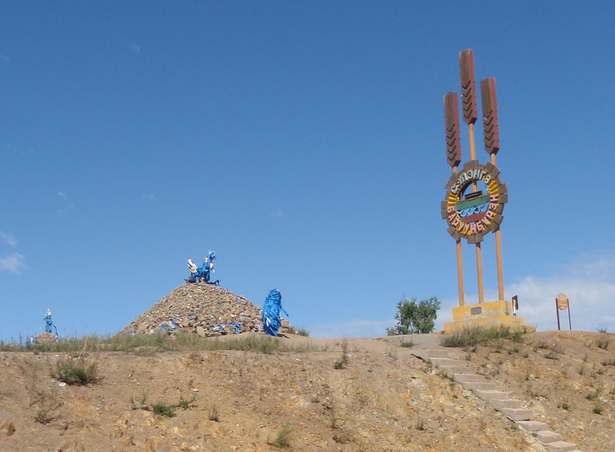 Barunnburen Sum im Selenge-Aimag